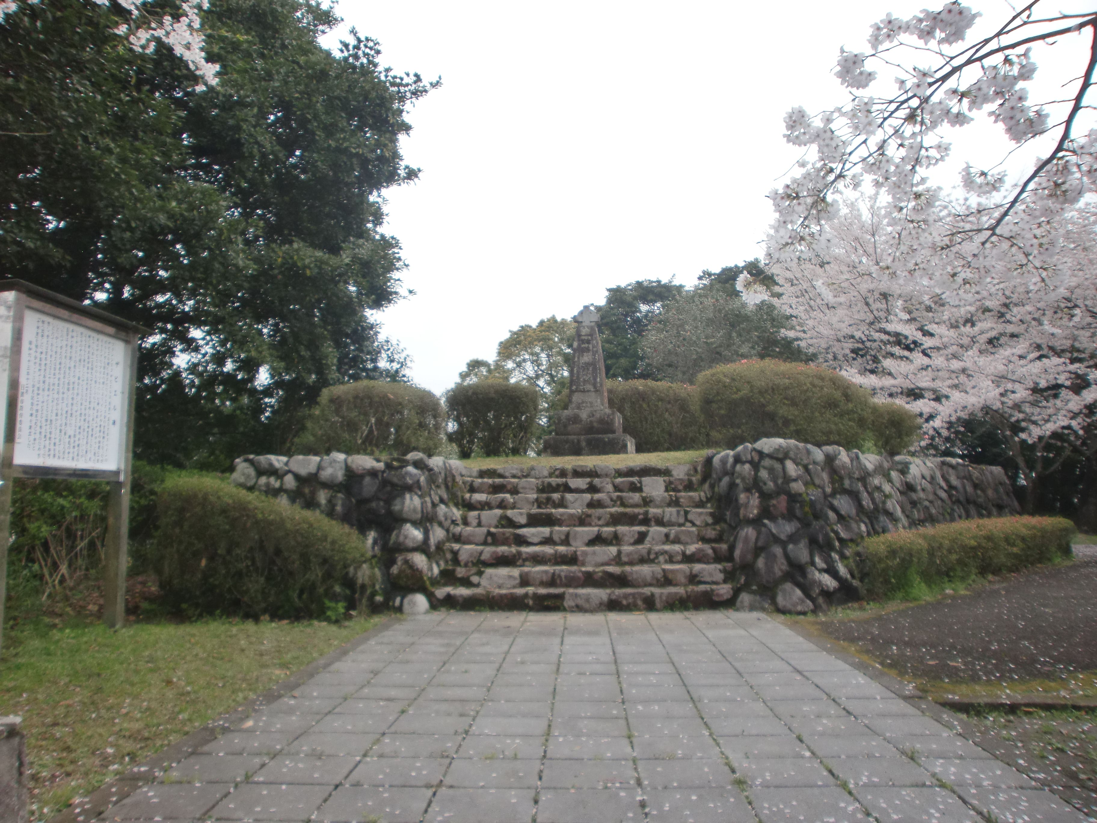 一宇治城址にあるザビエル会見の地。日本で初めてキリスト教の布教を許可された場所である。